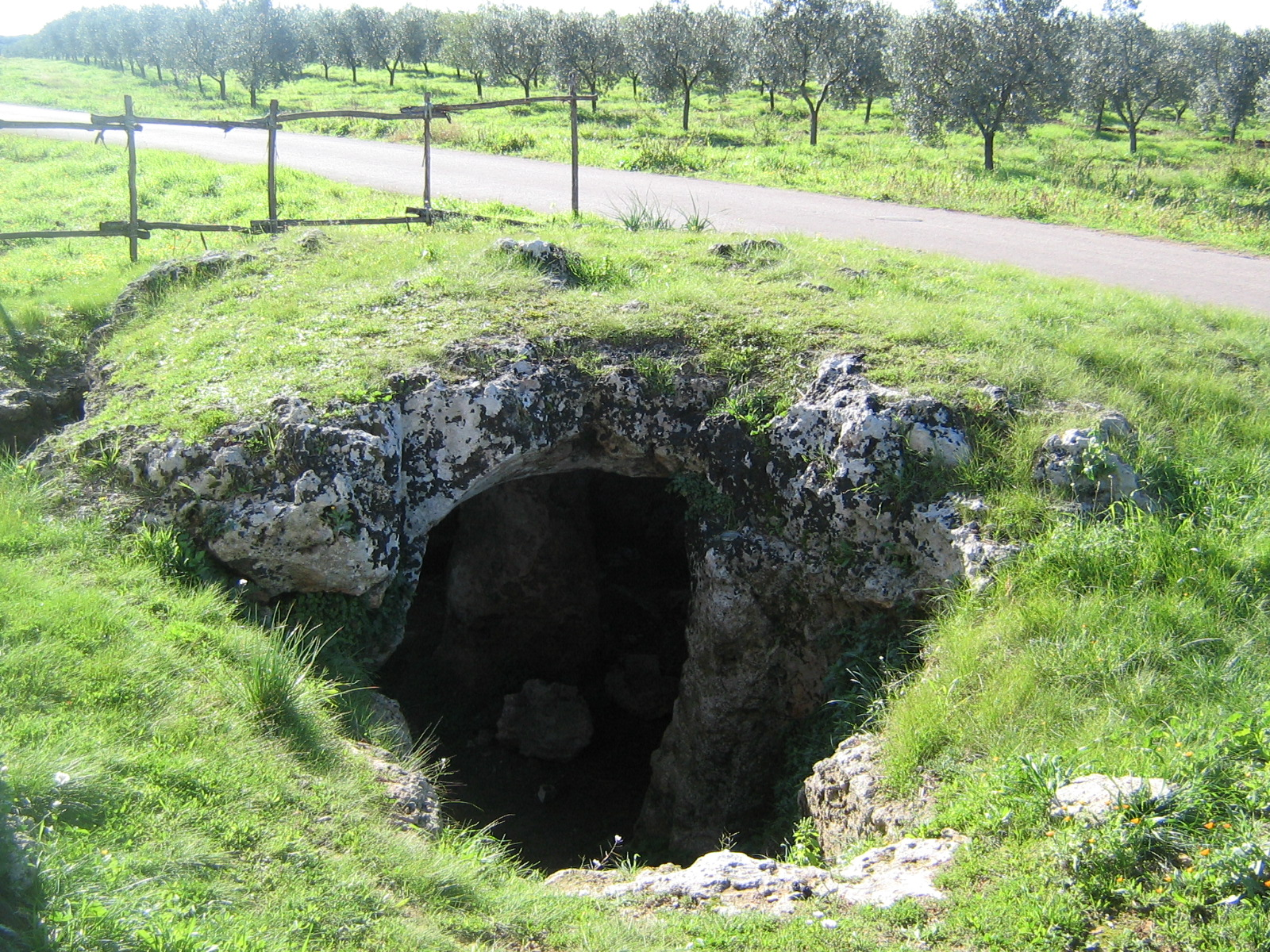 Cutrofiano Ingresso Cripta San Giovanni